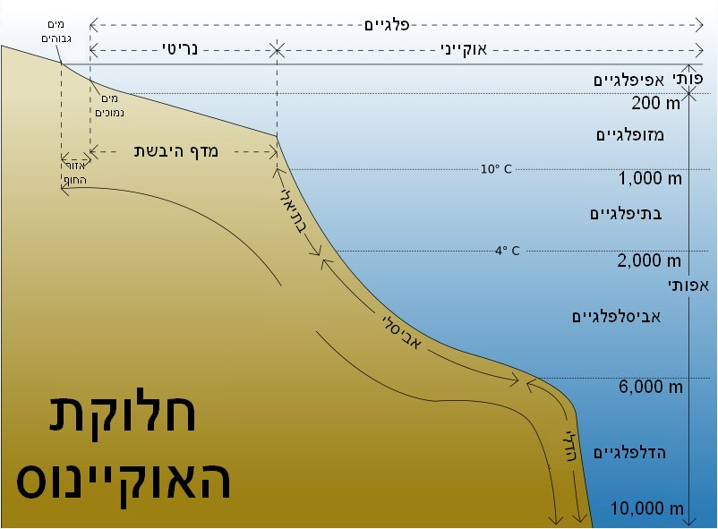 חלוקת האוקיינוס לאזורים